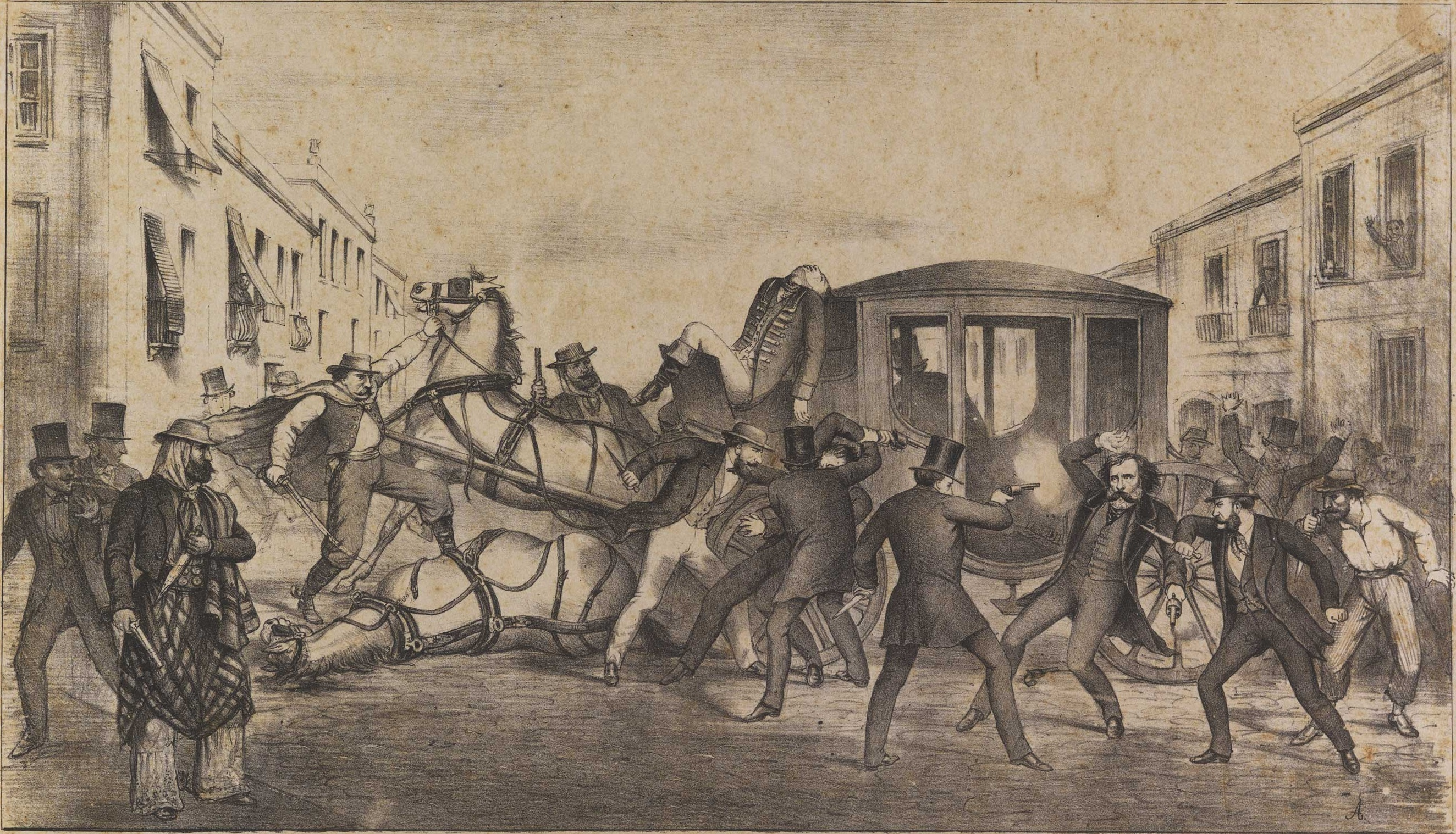 ASSASSINATO DO GENERAL D. VENANCIO FLORES, nas ruas de Montevidéo no dia 19 de Fevereiro próximo passado. (copiado fielmente de um desenho feito em Montevidéo pelo correspondente da — Vida Fluminense.